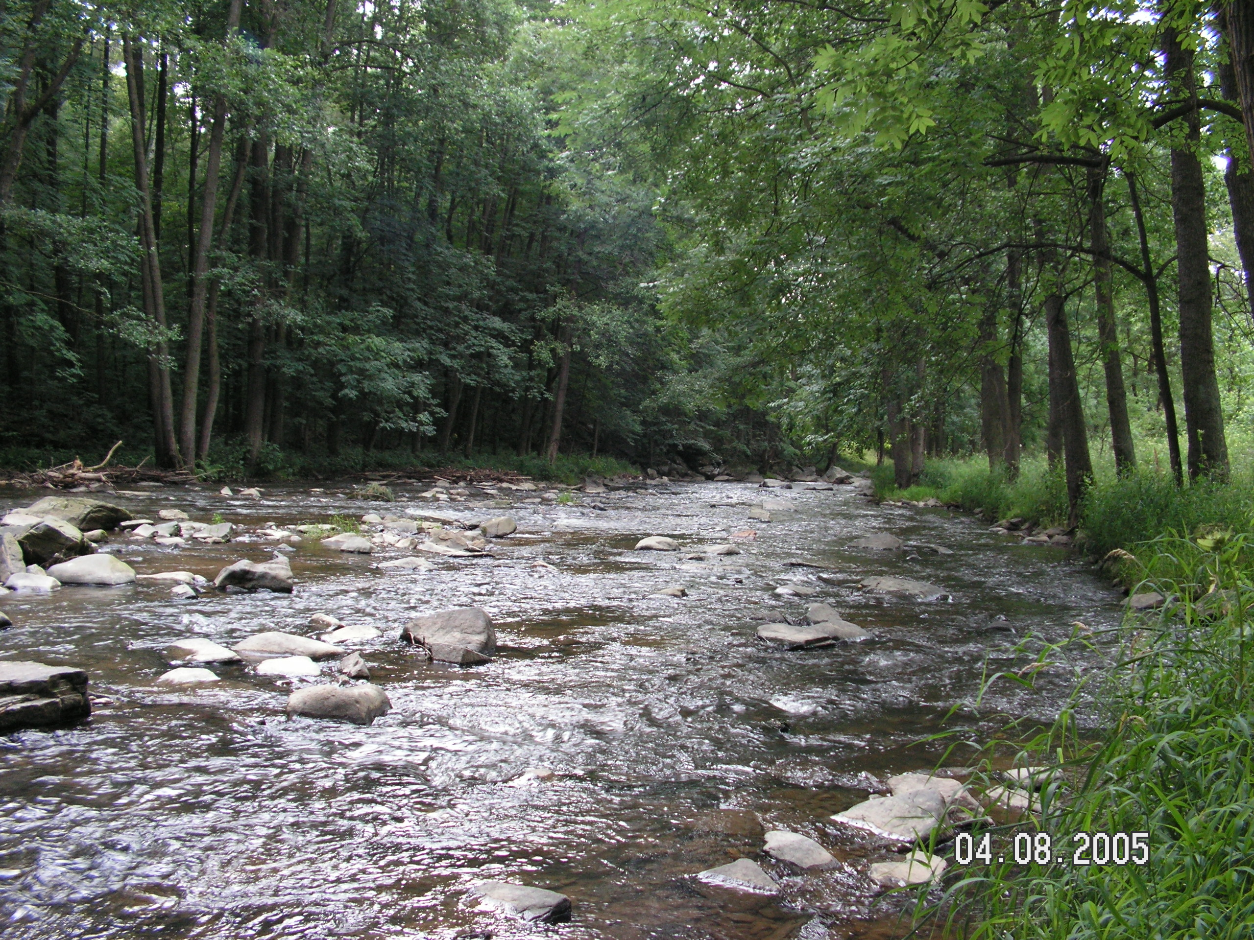 řeka Doubrava u Ronova